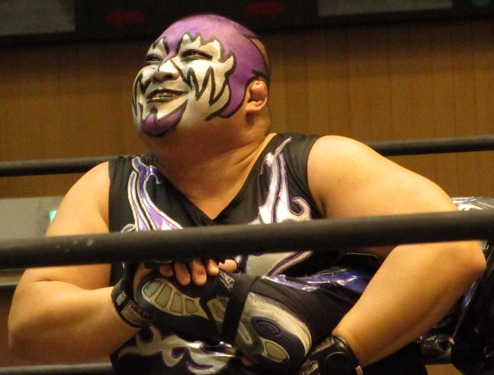 2016.7.30奈良